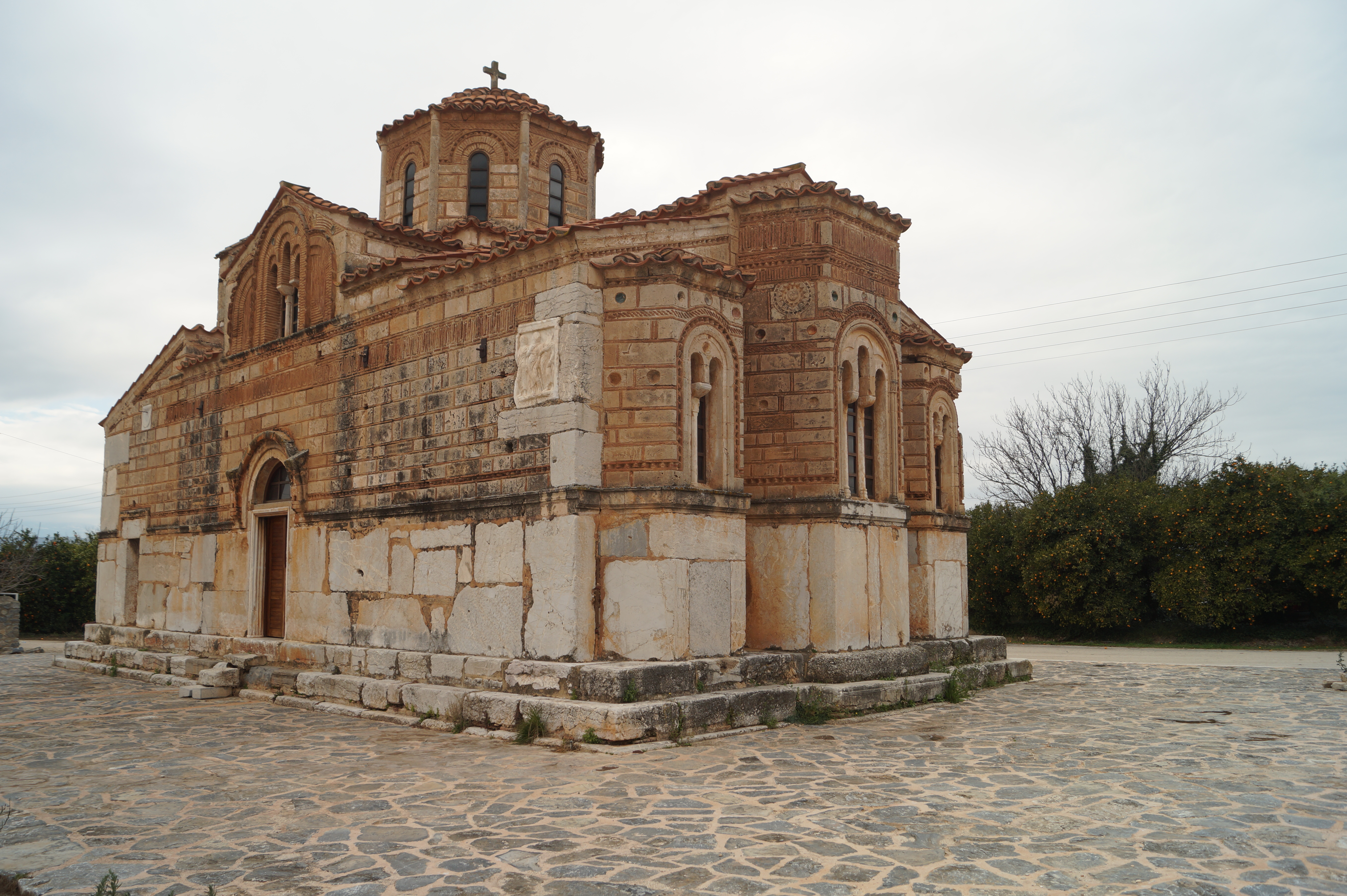 Ναός σταυροειδής εγγεγραμμένος με τρούλο, σύνθετου τετρακιόνιου τύπου, με νάρθηκα και προστώα. Εδράζεται σε κρηπίδα. Είναι κτισμένος χαμηλά κατά το ψευδοϊσόδομο σύστημα και ψηλότερα κατά το πλινθοπερίκλειστο. Ποικιλία κεραμοπλαστικών κοσμεί τις όψεις. Το μνημείο χρονολογείται στα τέλη του 12ου ή στον 13ο αιώνα. Στο εσωτερικό ο ναός έχει τοιχογραφίες βυζαντινών χρόνων.«Ναός Κοίμησης Θεοτόκου Μέρμπακα»